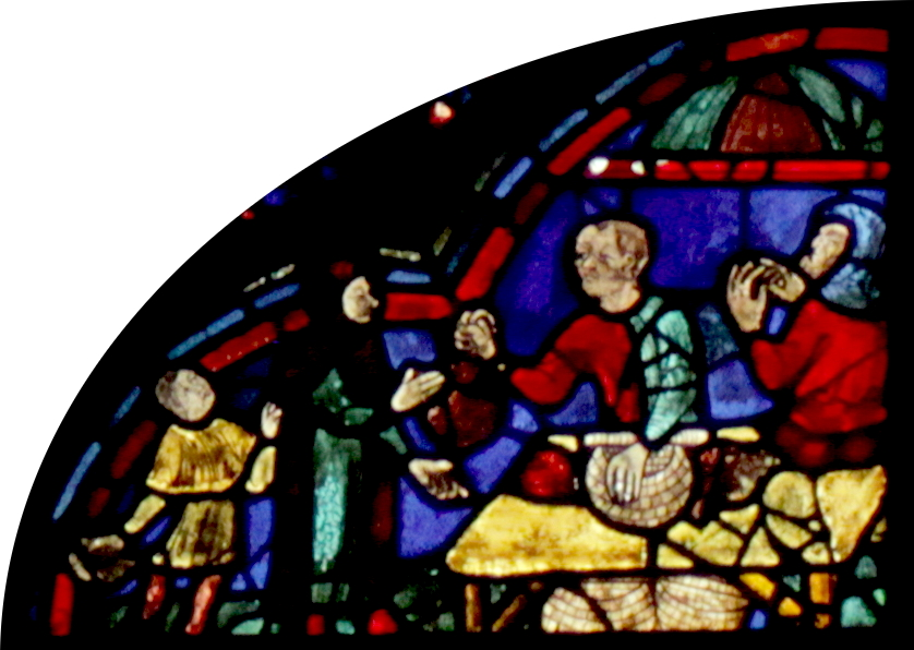 Excerpts from File:Vitrail Chartres-030-d rectifié.jpg